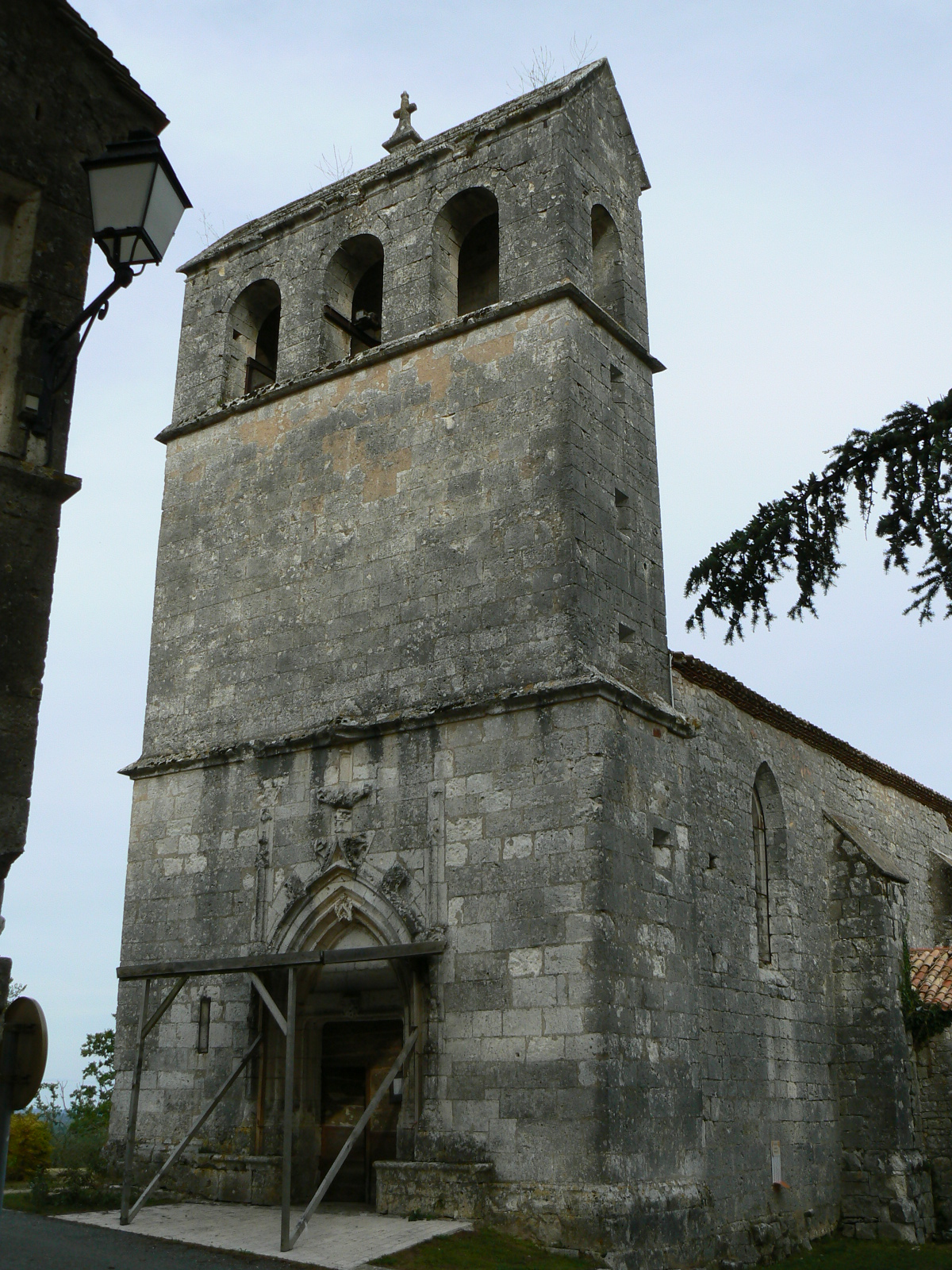 Église Saint-Pierre et Saint-Paul, (Inscription, 1948) .